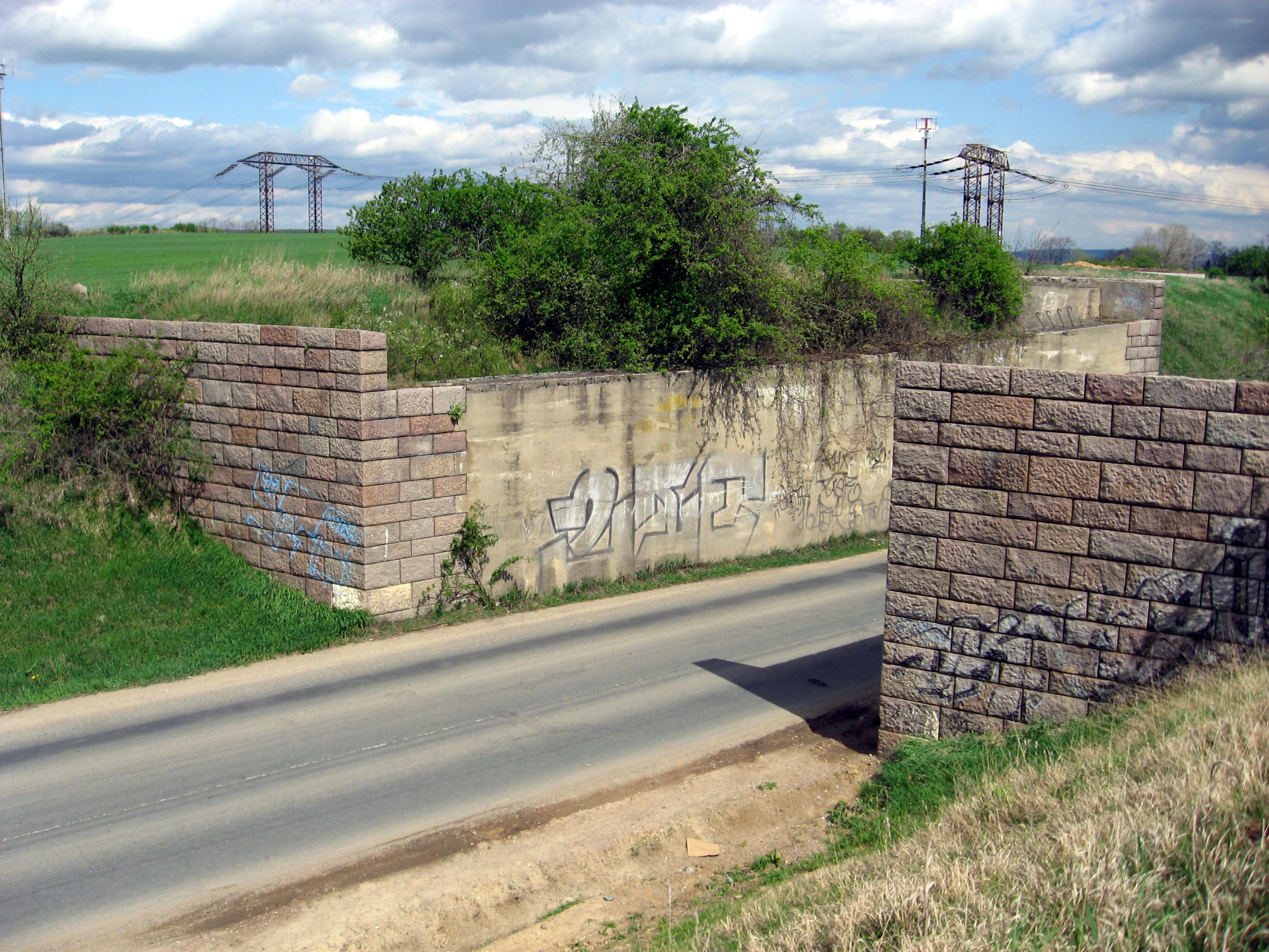 Nebovidy, dálnice Vratislav - Vídeň